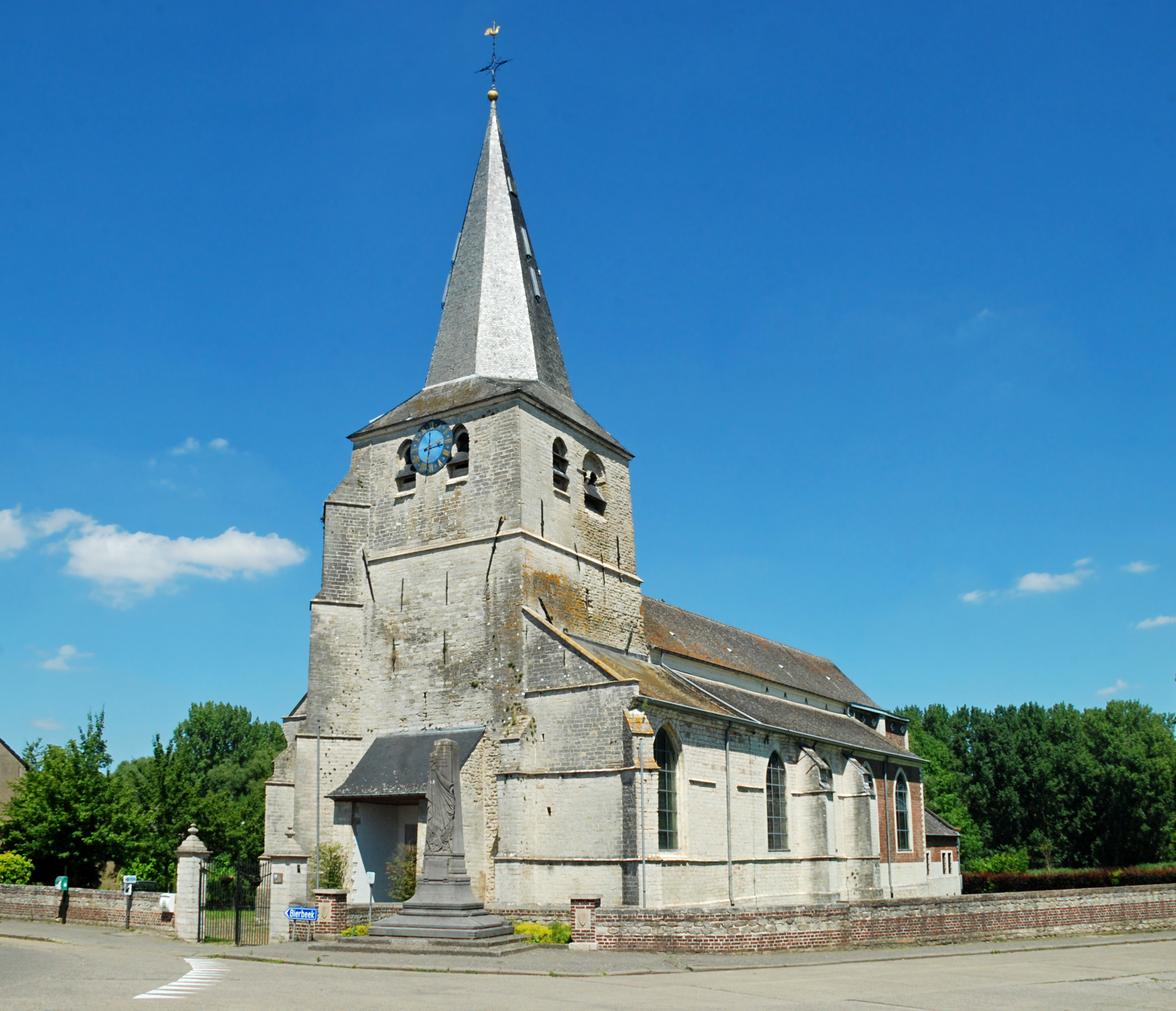 Belgique - Brabant flamand - Hoegaarden - Meldert (Maillard) - Église Sainte-Ermelinde This photo of immovable heritage has been taken in the Flemish Region